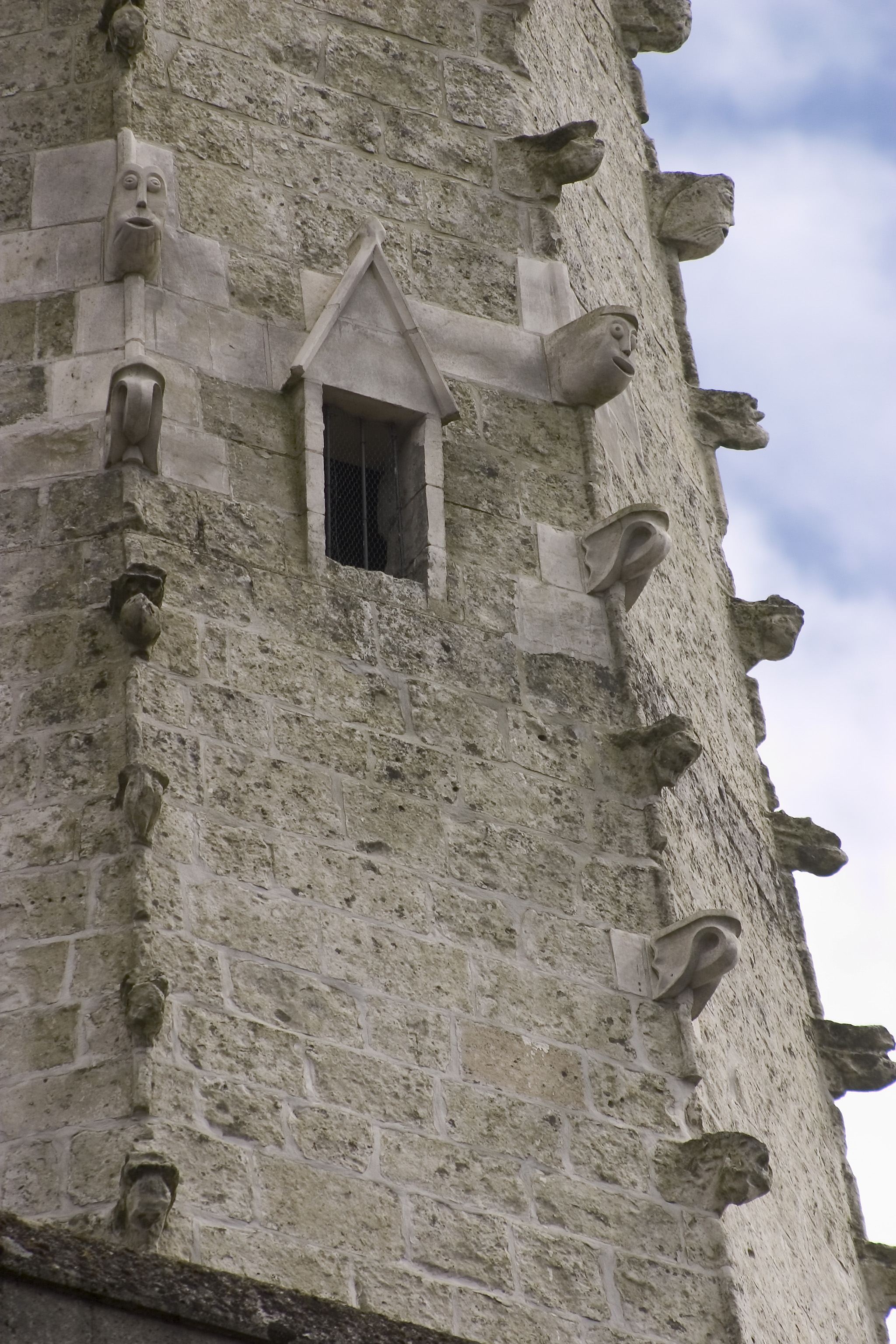 l'église de bethonsart